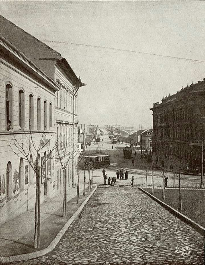 1900 körül. Margit híd, Margit körút a Margit utcából nézve